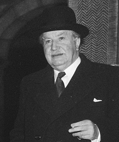 Original caption: "Benelux-conferentie in Den Haag van 10 t/m 12 maart 1949. De Luxemburgse delegatie. " — Nationaal Archief